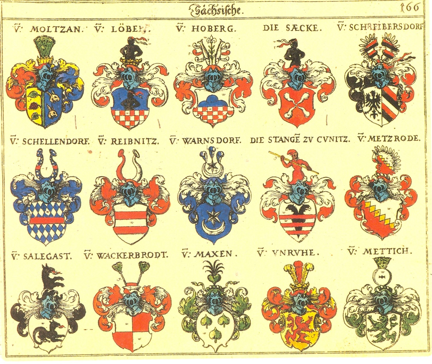 Johann Siebmacher: New Wappenbuch eingescannt aus: Horst Appuhn (Hrsg.), Johann Siebmachers Wappenbuch. Die bibliophilen Taschenbücher 538, 2. verb. Aufl , Dortmund 1989 Sachsen Blatt 166